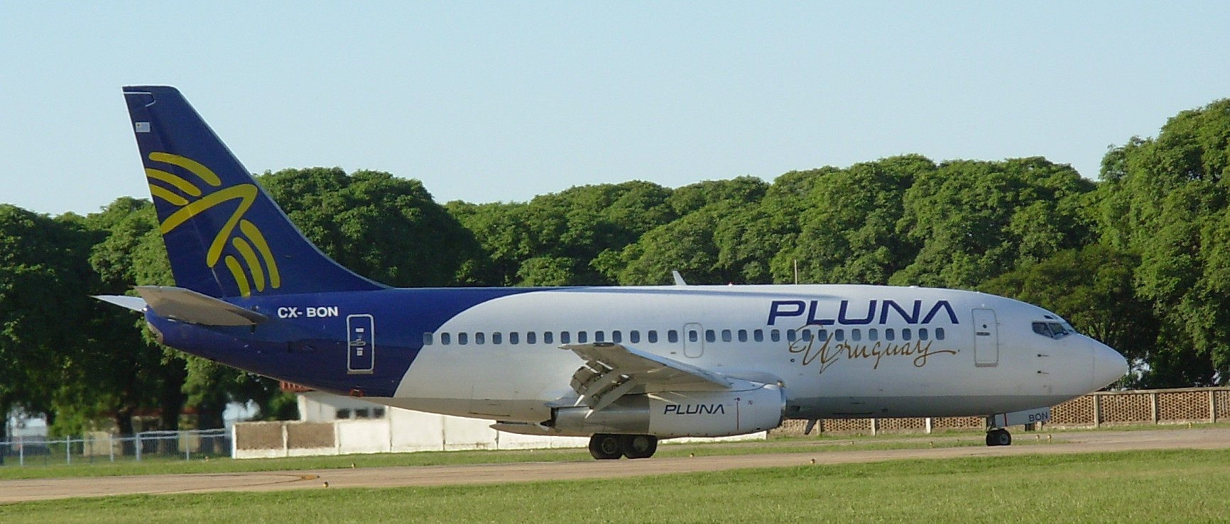 Boeing B737-200 urguwajskich linii lotniczych "Pluna" na lotnisku Aeroparque Jorge Newbery w Buenos Aires. 11 lutego 2006 r.